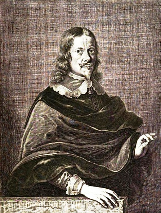 Johannes Hevelius (1611-1687) Portrait aus der Selenographia (1647) Gemeinfrei durch Alter